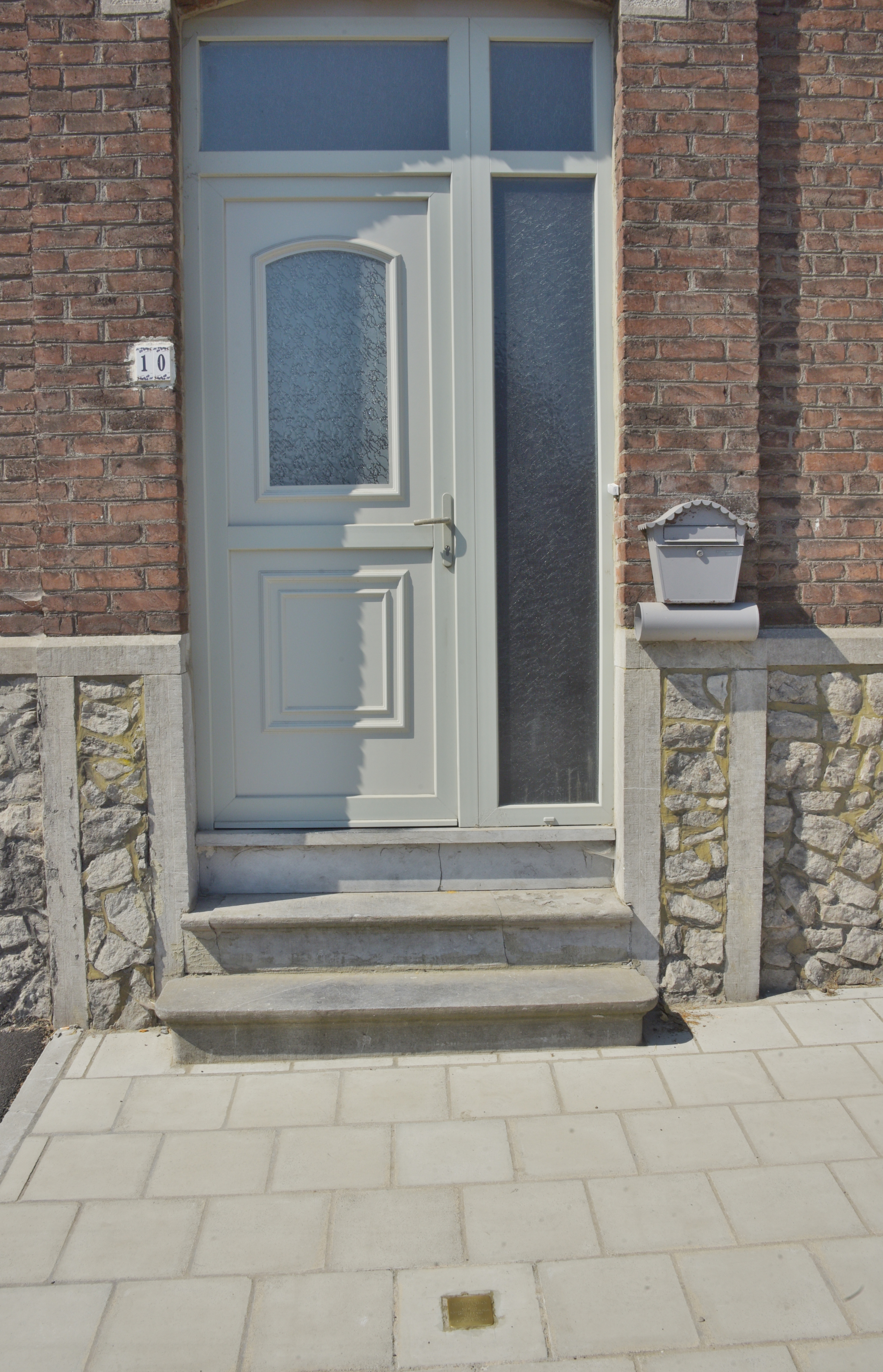 Stolperstein für Fernand Lalieux, Rue Fernand Lalieux 10